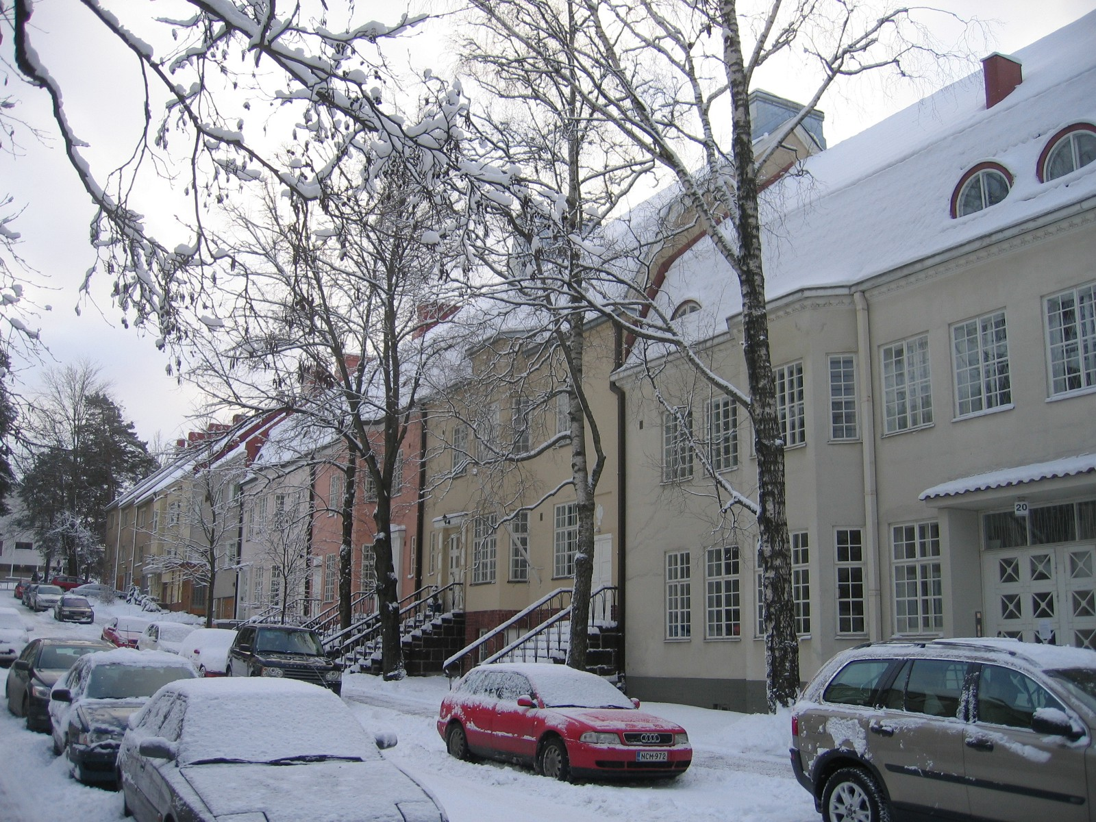 Hollantilaisentie/Holländarvägen in Munkkiniemi in Helsinki, Finland